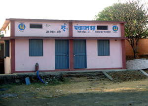 बंडोल